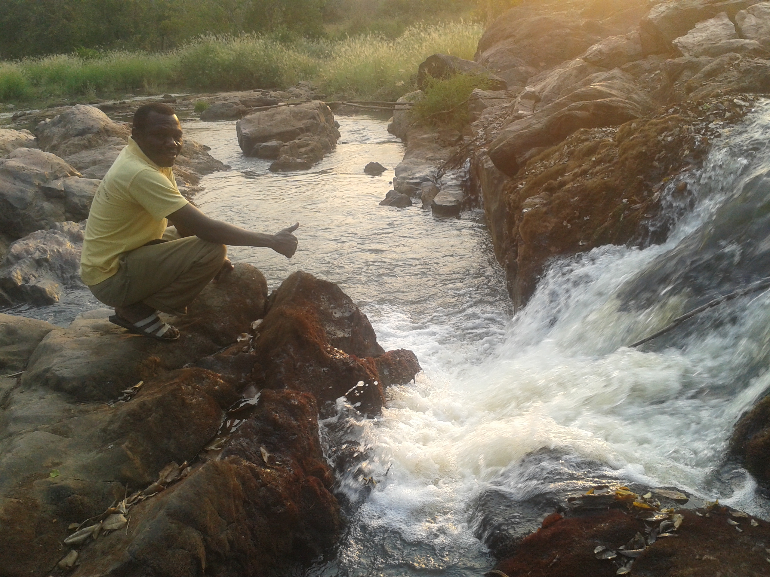 Chute de Nana Bakassa en RCA This is an image of Cultural Fashion or Adornment from Central African Republic